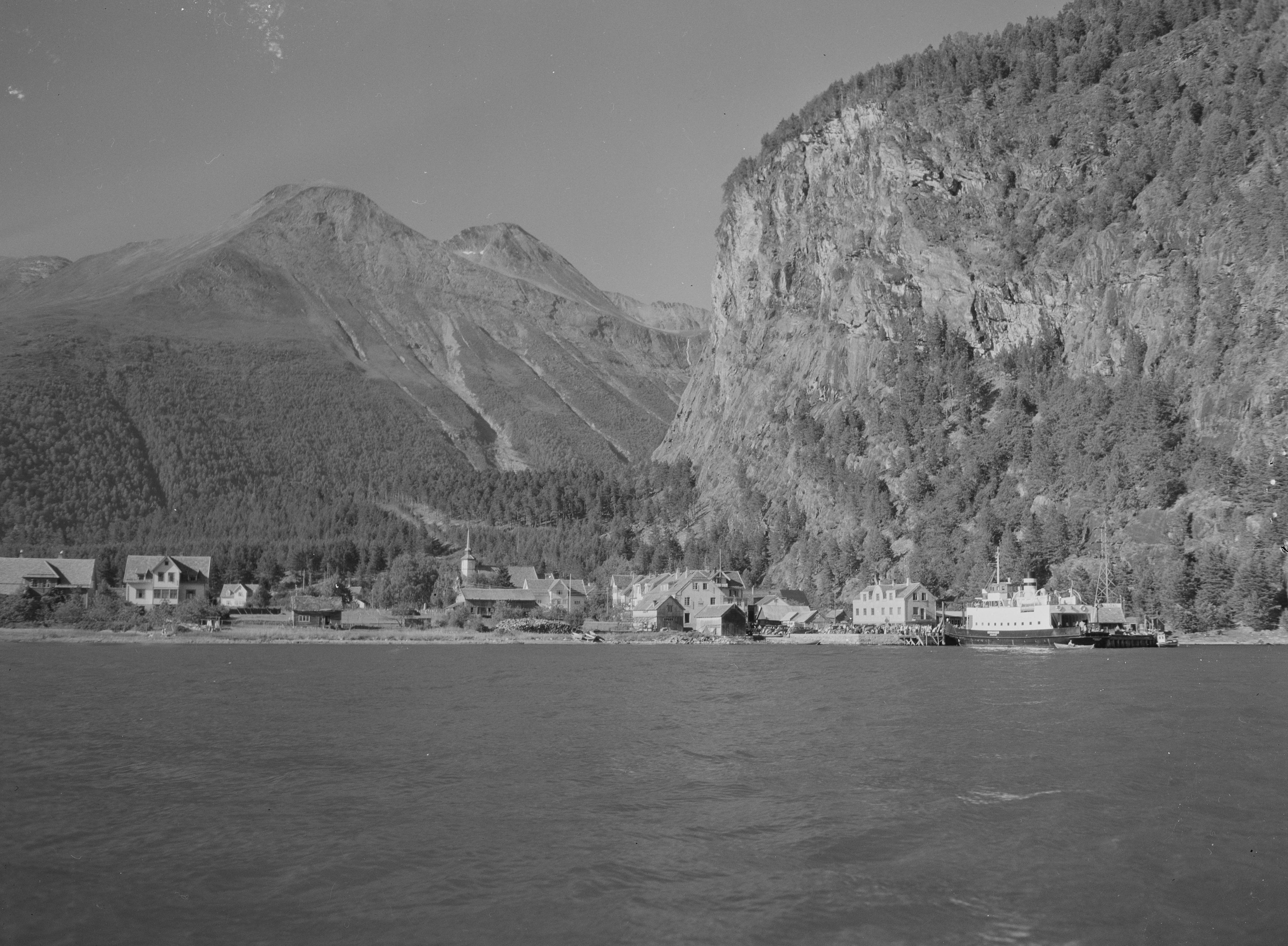 Bildet er hentet fra Nasjonalbibliotekets bildesamling. Anmerkninger til bildet var: Fotograf : ukjent Valldal, Norddal, Møre og Romsdal